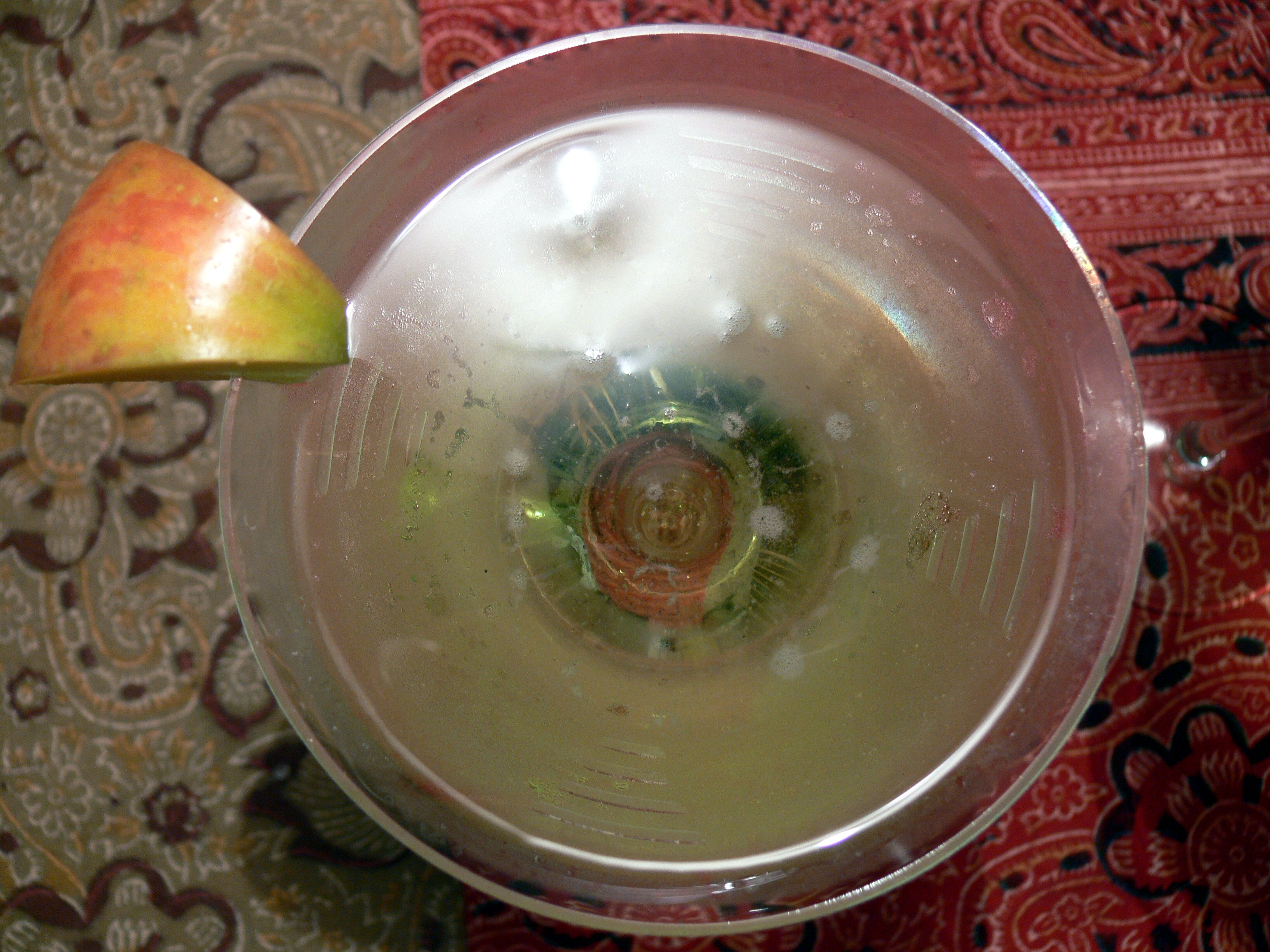 Ein Apple Martini (Appletini).